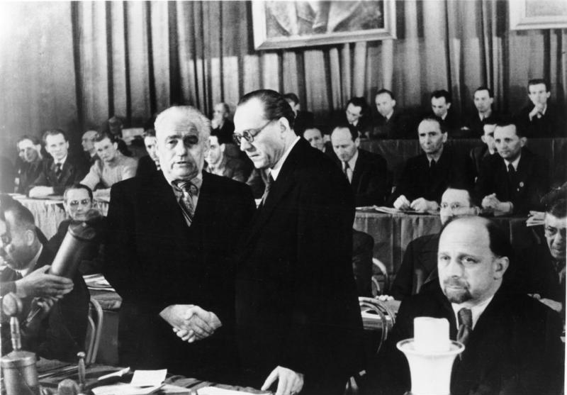 ADN-ZB/Archiv/10.9.1980 Erich Honecker (3. Reihe, 2.v.l.) im Präsidium des Vereinigungsparteitages von Kommunistischer Partei Deutschlands und Sozialdemokratischer Partei Deutschlands zur Sozialistischen Einheitspartei Deutschlands am 21./22. April 1946 in Berlin. In der 1. Reihe (v.r.n.l.): Walter Ulbricht, Otto Grotewohl und Wilhelm Pieck bei ihrem historischen Händedruck.